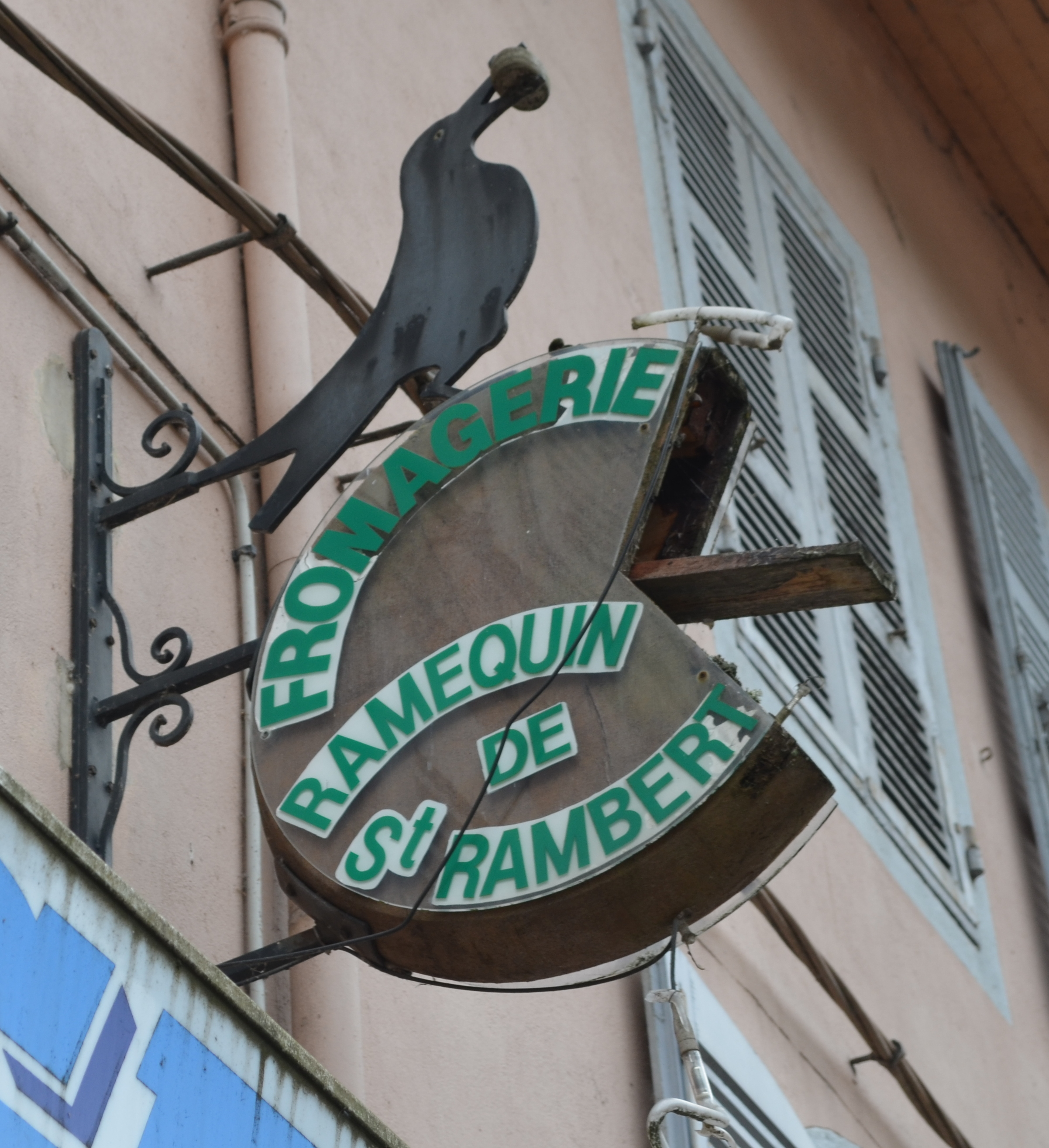 Fromagerie à Saint-Rambert.